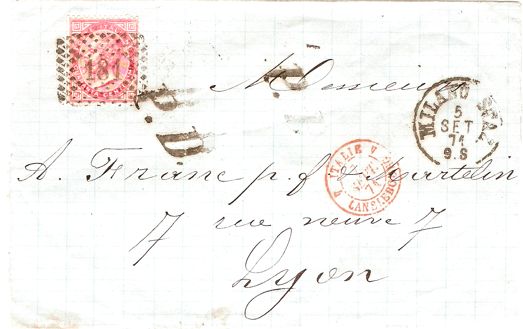 Lette de 1871 postée à Milan et passée par Lanslebourg